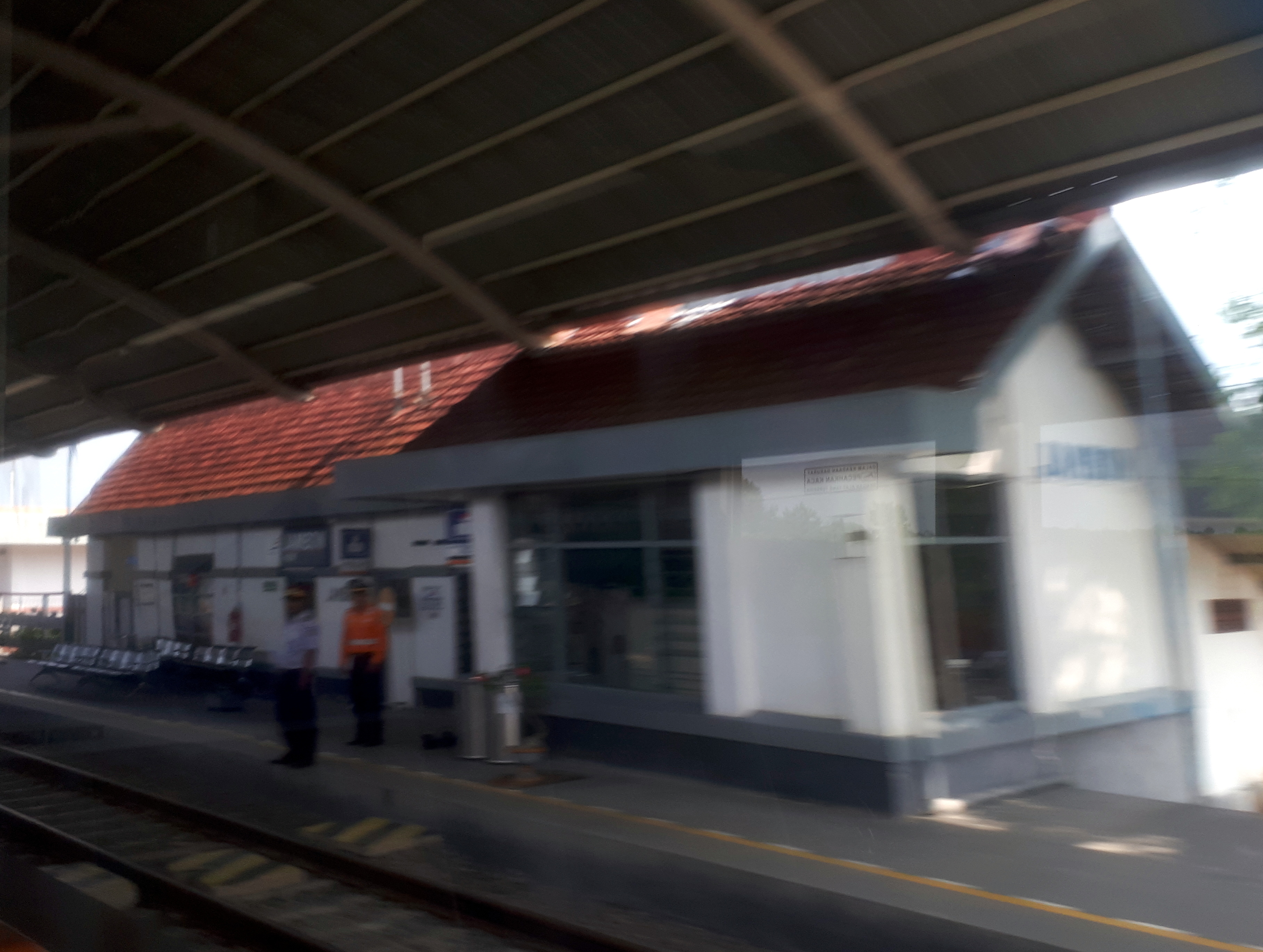 Stasiun Jambon tahun 2020